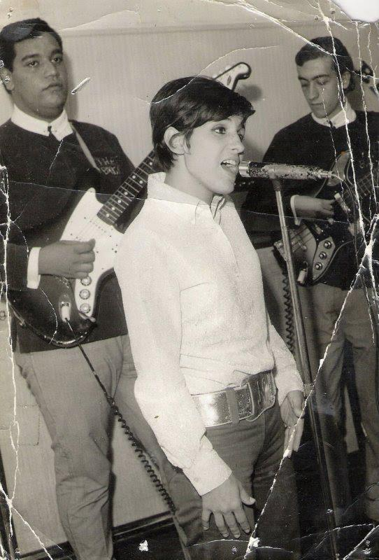 Em 1967